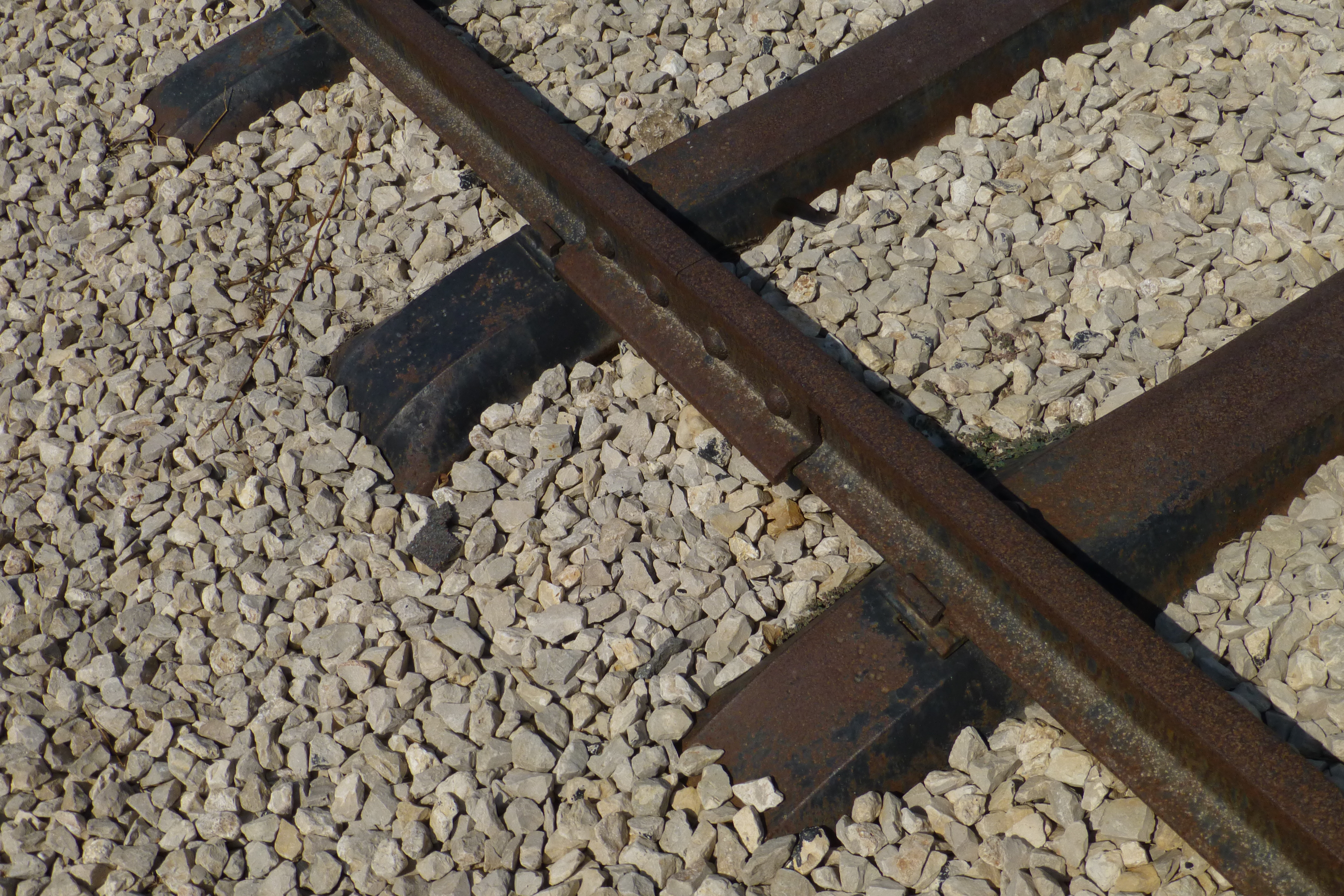 רכבת העמק - מעבירי מים והסוללה - צומת העמקים